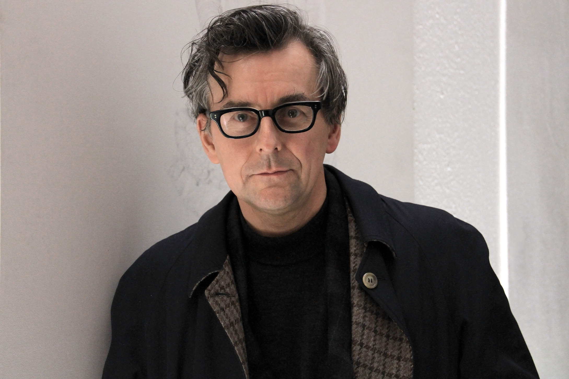 Johannes Silberschneider beim Nestroy-Theaterpreis 2012 im MuseumsQuartier in Wien.